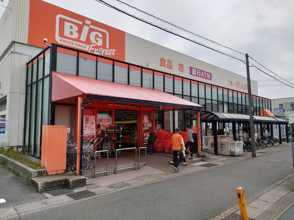 ザ・ビッグ エクスプレス花ノ木店（愛知県名古屋市守山区）。イオンビッグ運営（旧：マックスバリュ中部運営）。